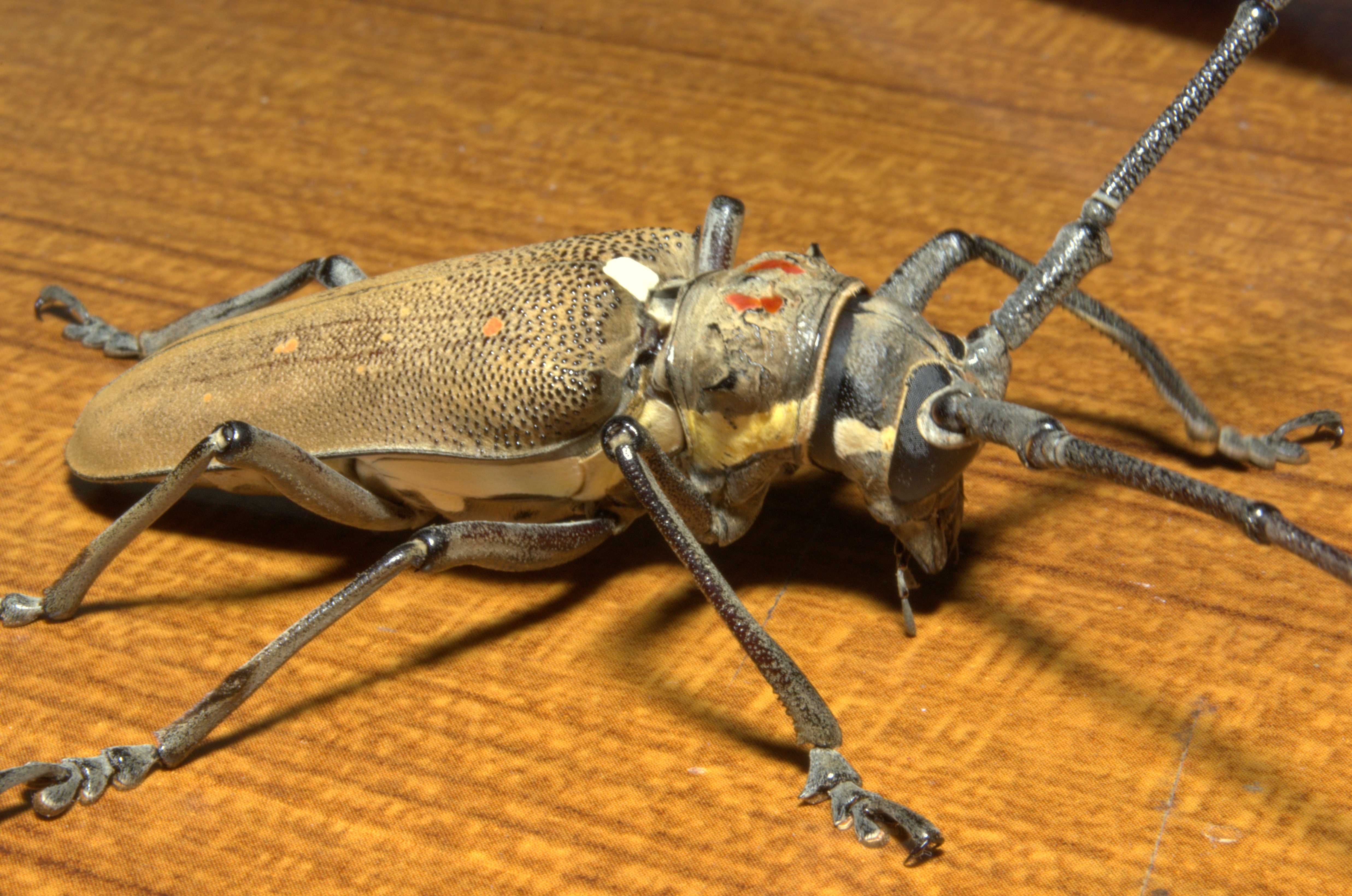 beetle